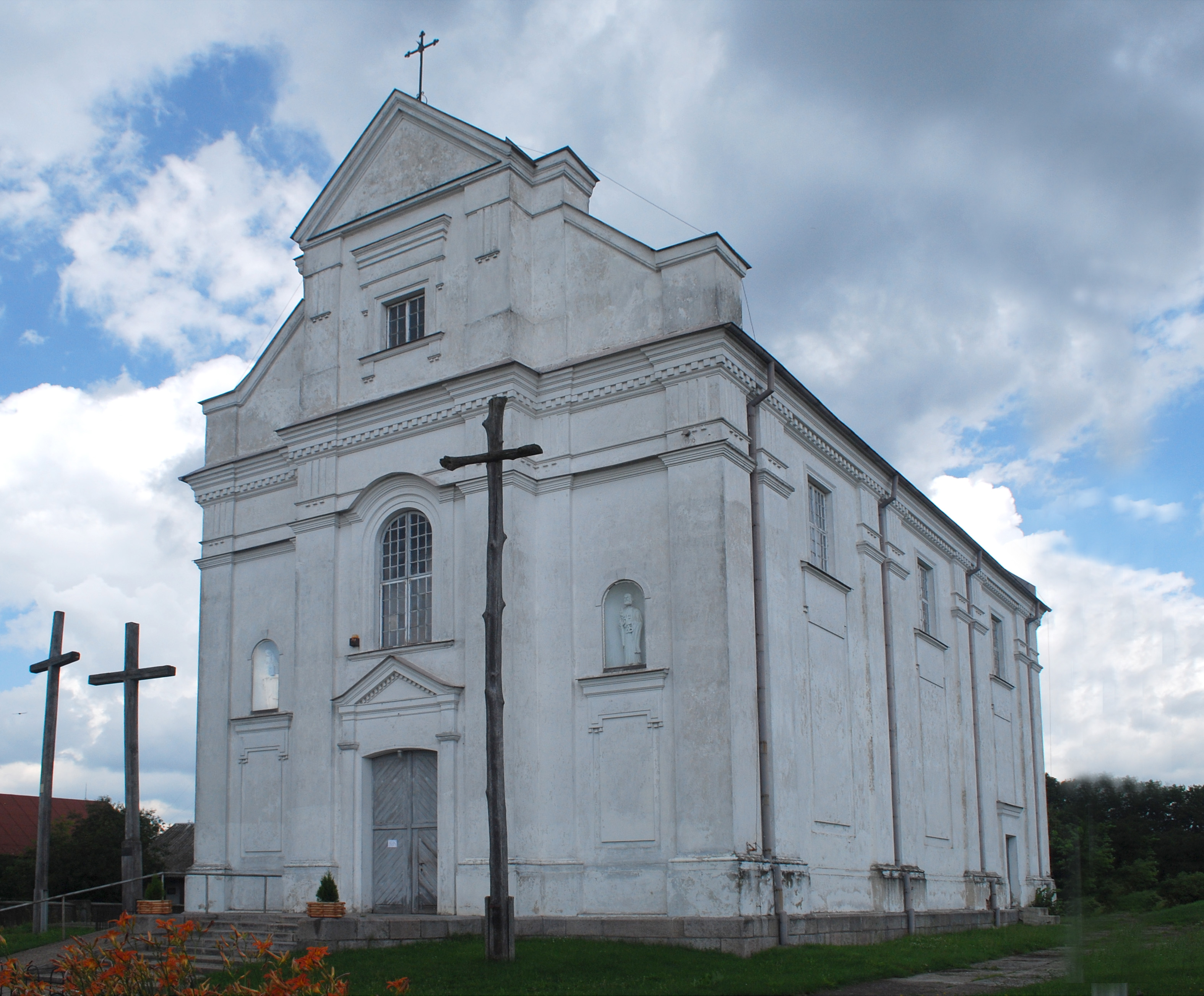 Kościół św. Zygmunta w Kleszczelach. The making of this document was supported by Wikimedia Polska.